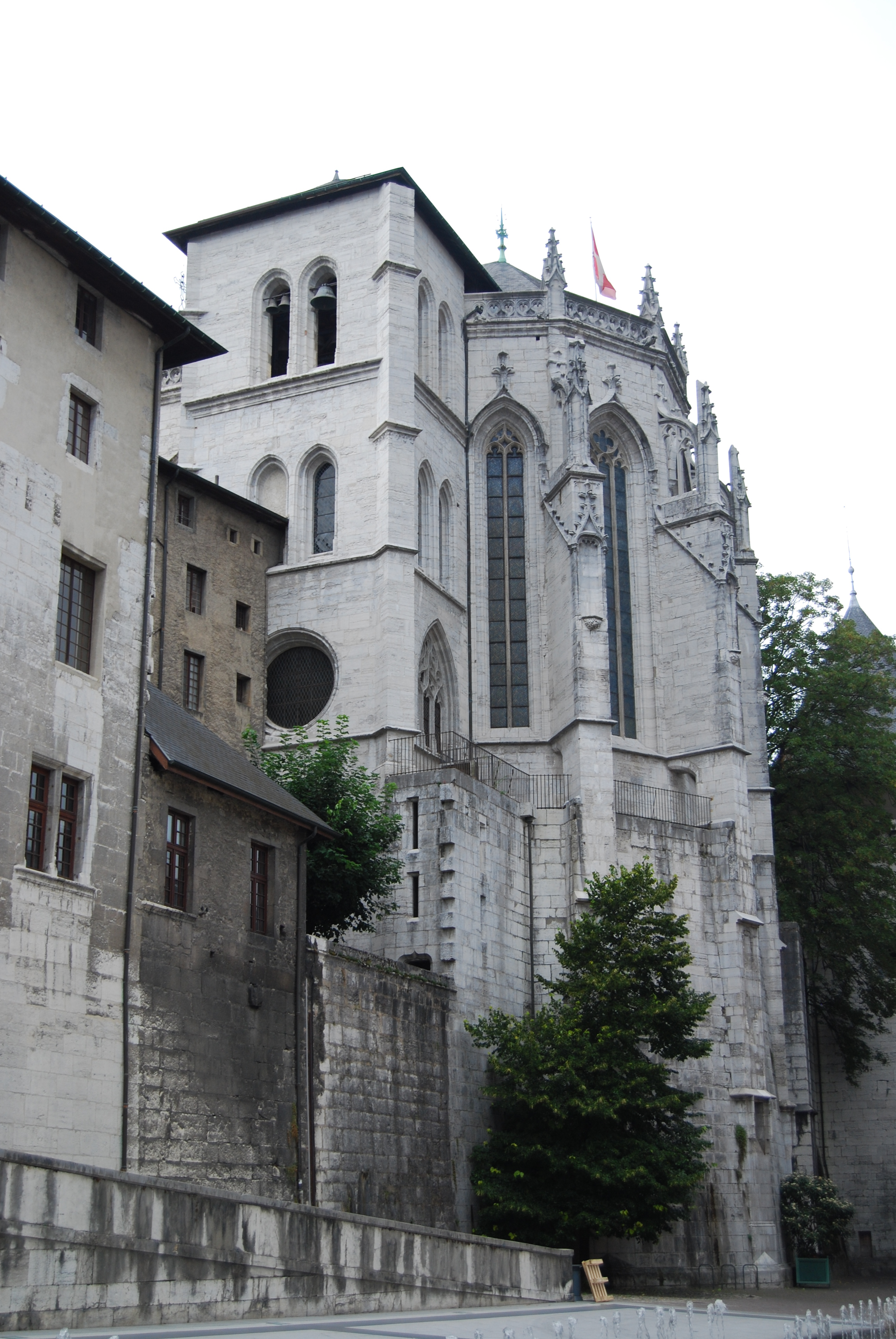 La Sainte Chapelle de Chambéry est construite de 1408 à 1425 par Amédée VIII. A l'origine chapelle du Château et de la paroisse, elle est connu pour avoir abrité de 1502 à 1563 le Saint-Suaire. Incendiée en 1532, abimée en 1792, elle a été rénovée en 1836, 1959 et 1992. Elle est classée monument historique.